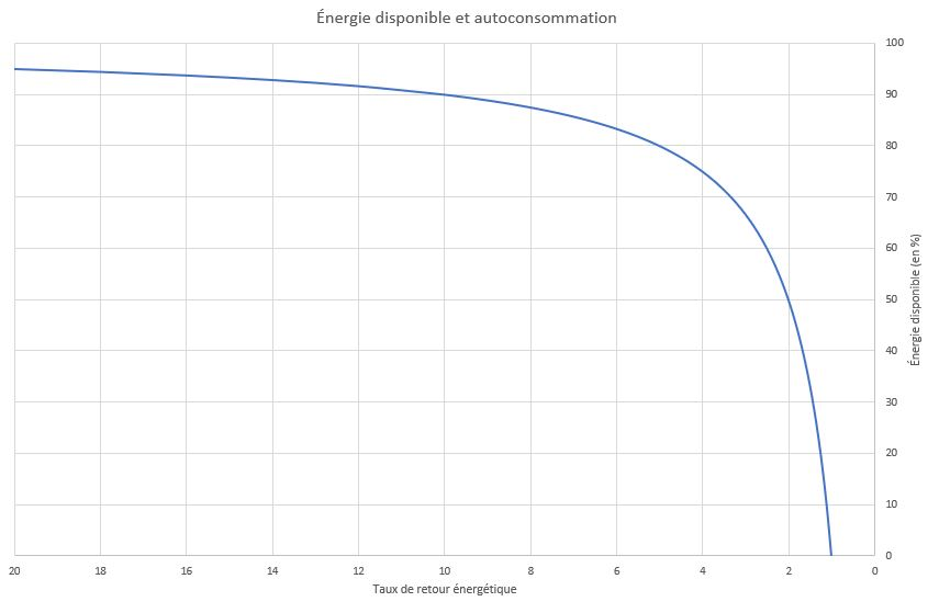 L'énergie nette relative est représentée en fonction du ErOEI. Le complément n'est autre que de l'autoconsommation. Travail inspiré de